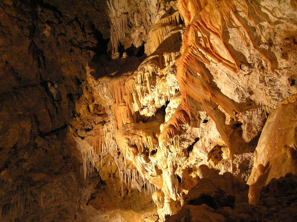 L'underground che non t'aspetti, a pochi passi dalla riviera, vicino a Finale Ligure